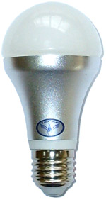 Светодиодные лампы с цоколем Е27 применяются в любом типе осветительных приборов. Мгновенный разогрев (до 1 сек.) без эффекта мерцания. Непосредственное питание от источника 220В, 50Гц без трансформатора и электронного устройства управления. Изготавливается в обычном цоколе (Е27), аналогичном привычным лампам. Вибрационная устойчивость - нет нити накала. Ударная устойчивость - изготавливаются в небьющемся корпусе из алюминия, светодиоды закрыты толстым стеклом. Корпус – алюминий и стекло. Для формирования светового потока используется матовое стекло. Технические характеристики ламп Тегас с цоколем E-27 Цоколь Е-27 Потребляемая мощность = эквивалентная мощность лампы накаливания 4Вт=75Вт Световой поток 500Lm Освещенность 90Lx Диаграмма освещенности 200° Цвет свечения - Цветовая температура холодный белый - 6500К Напряжение питания 100-260В Номинальное напряжение питания 220В Частота 50-60Гц Диаметр 60мм Высота 116мм Нормативный срок службы 35 000 часов Область применения: • Небольшие офисы; • Приемные и помещения общественных служб; • Небольшие продуктовые и непродовольственные магазины; • Производственные помещения с нормальными условиями среды; • Учебные и медицинские помещения; • Бытовые и жилые помещения; • Наружное освещение; • Рестораны, кафе; • Салоны красоты; • Гостиницы.